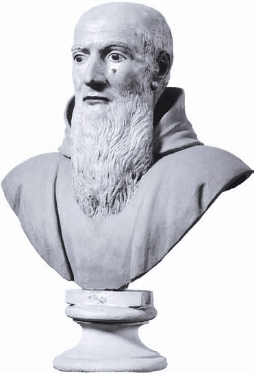 Busto del medico e chiururgo Cesare Magati